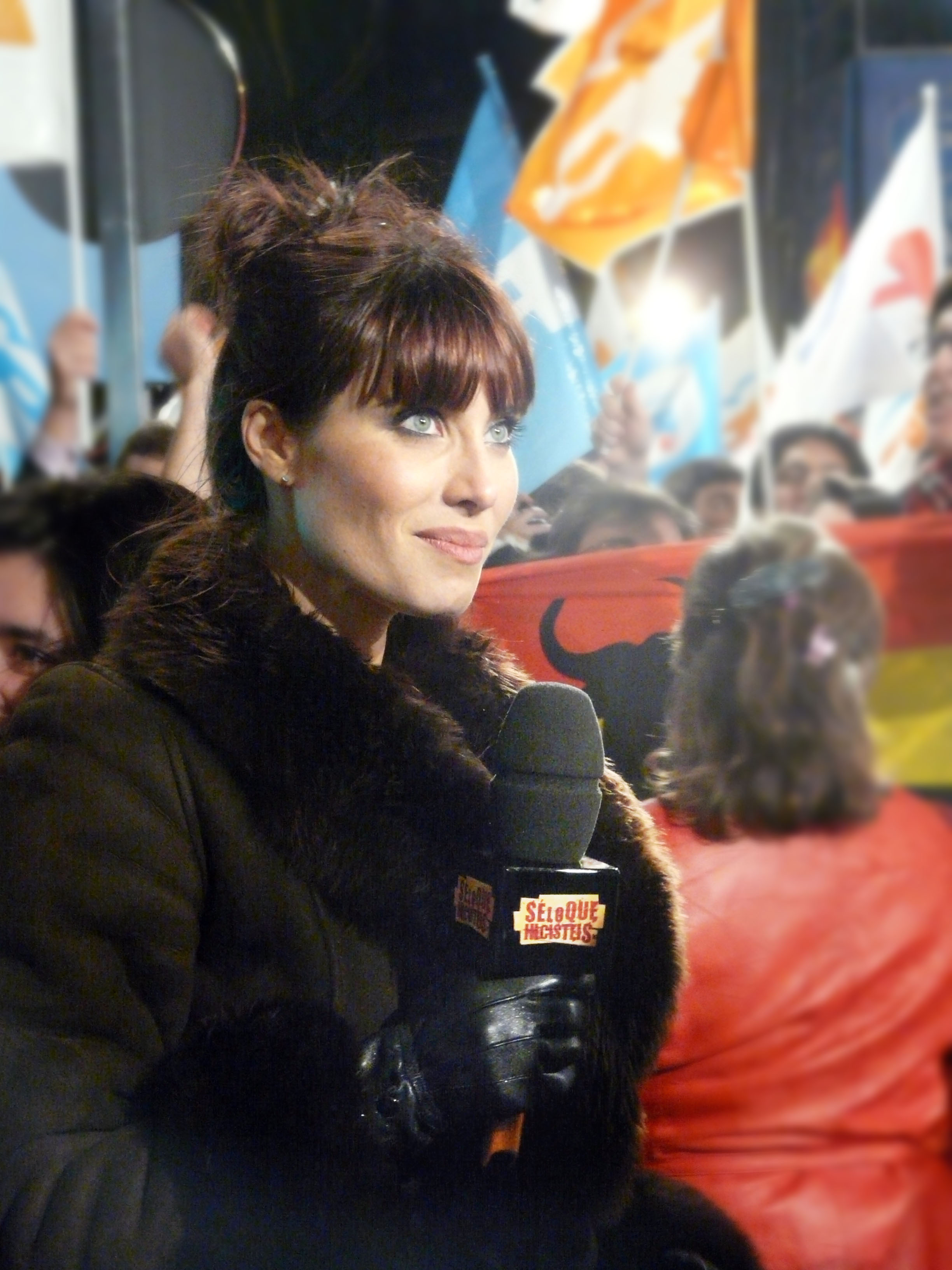 Pilar Rubio, reportera del programa Se lo que hicisteis..., durante la noche de las elecciones el 9 de marzo, en la sede del PP.